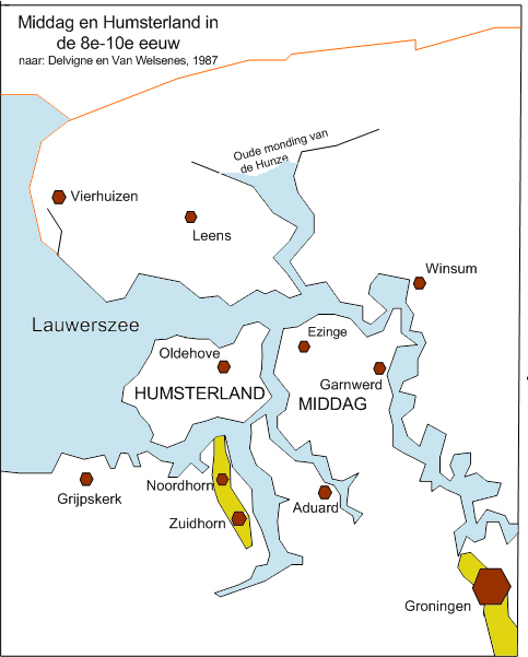 Zelf getekende kaart op basis van een kaart in J.J. Delvigne en Chr. van Welsenes, Westelijk Groningen. Wording van het landschap tussen Drents Plateau en Waddenzee, Geografisch Tijdschrift, 1982, 263 Map of the region Middag-Humsterland in the northern part of the Netherlands in the period 800-1000